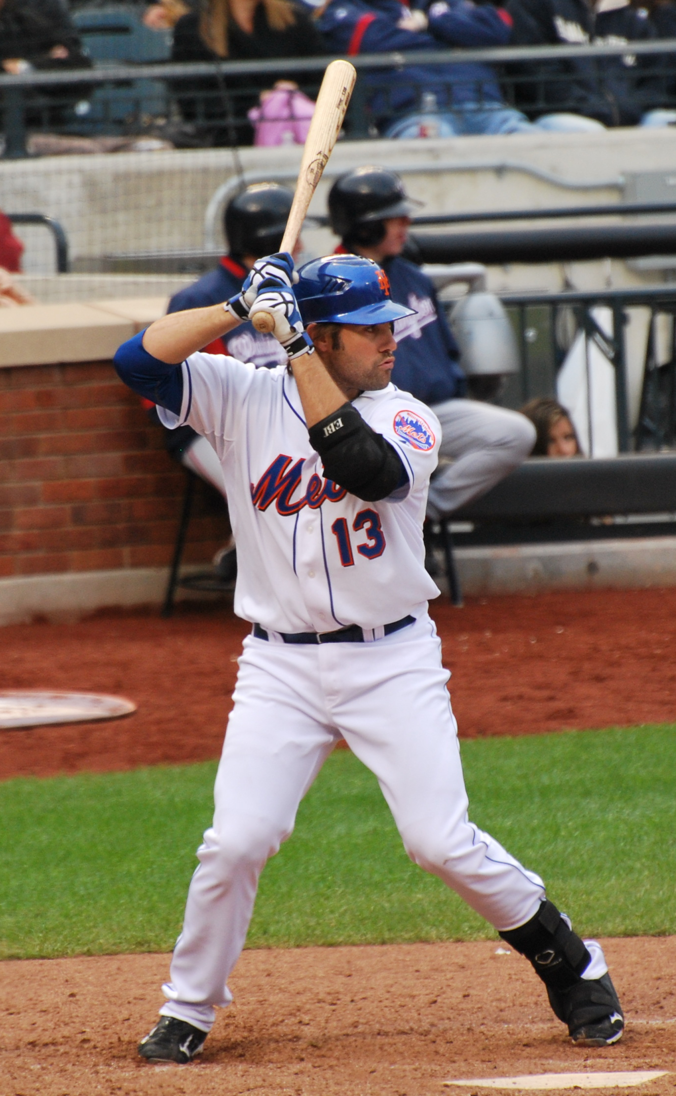 Mike Nickeas